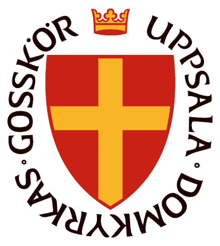 UDG:s logga delar färger med Svenska Kyrkan.